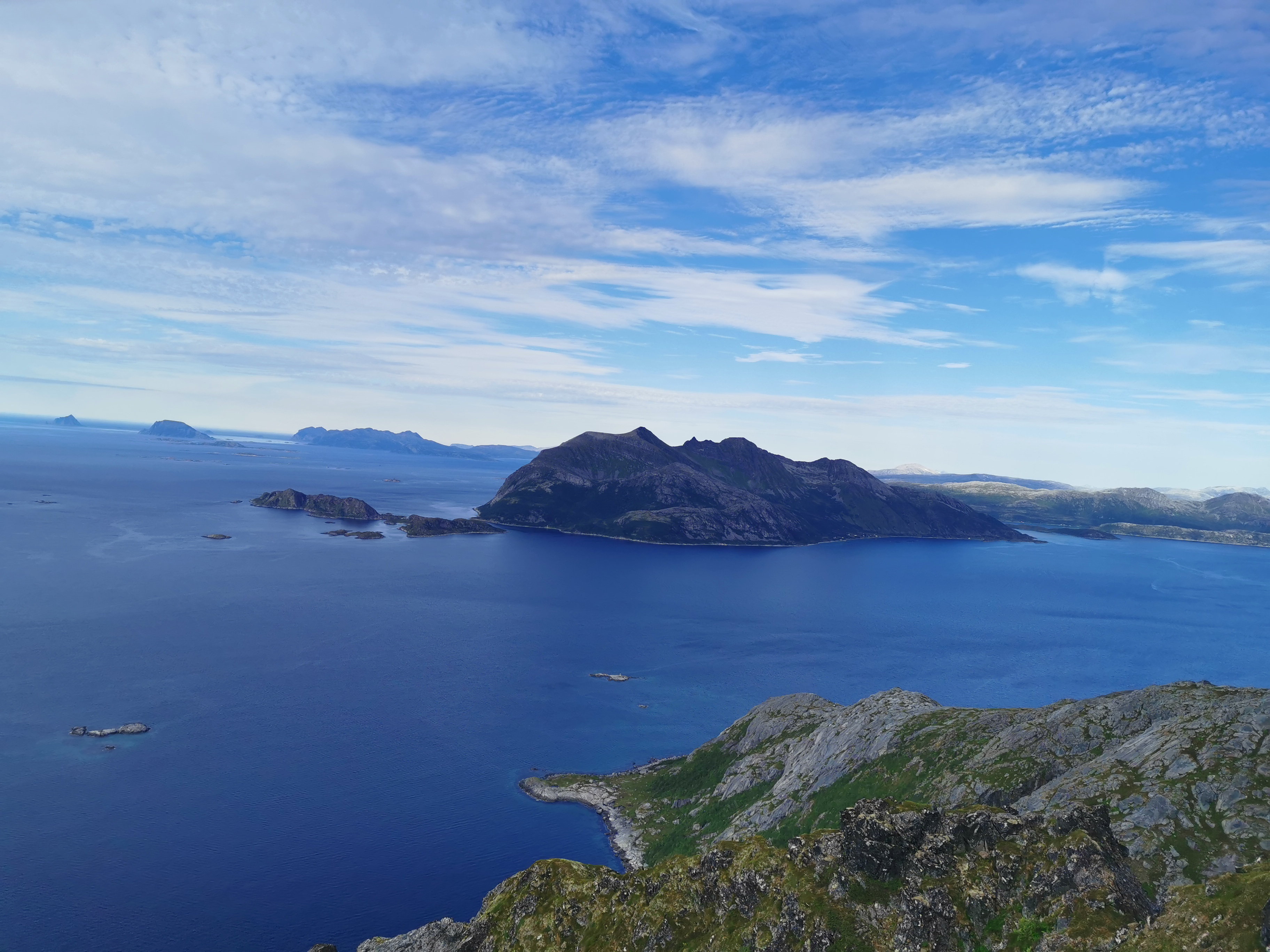 Vengsøya. Til venstre Gjøssøya og Kjeøya. Foto fra Tromtind.